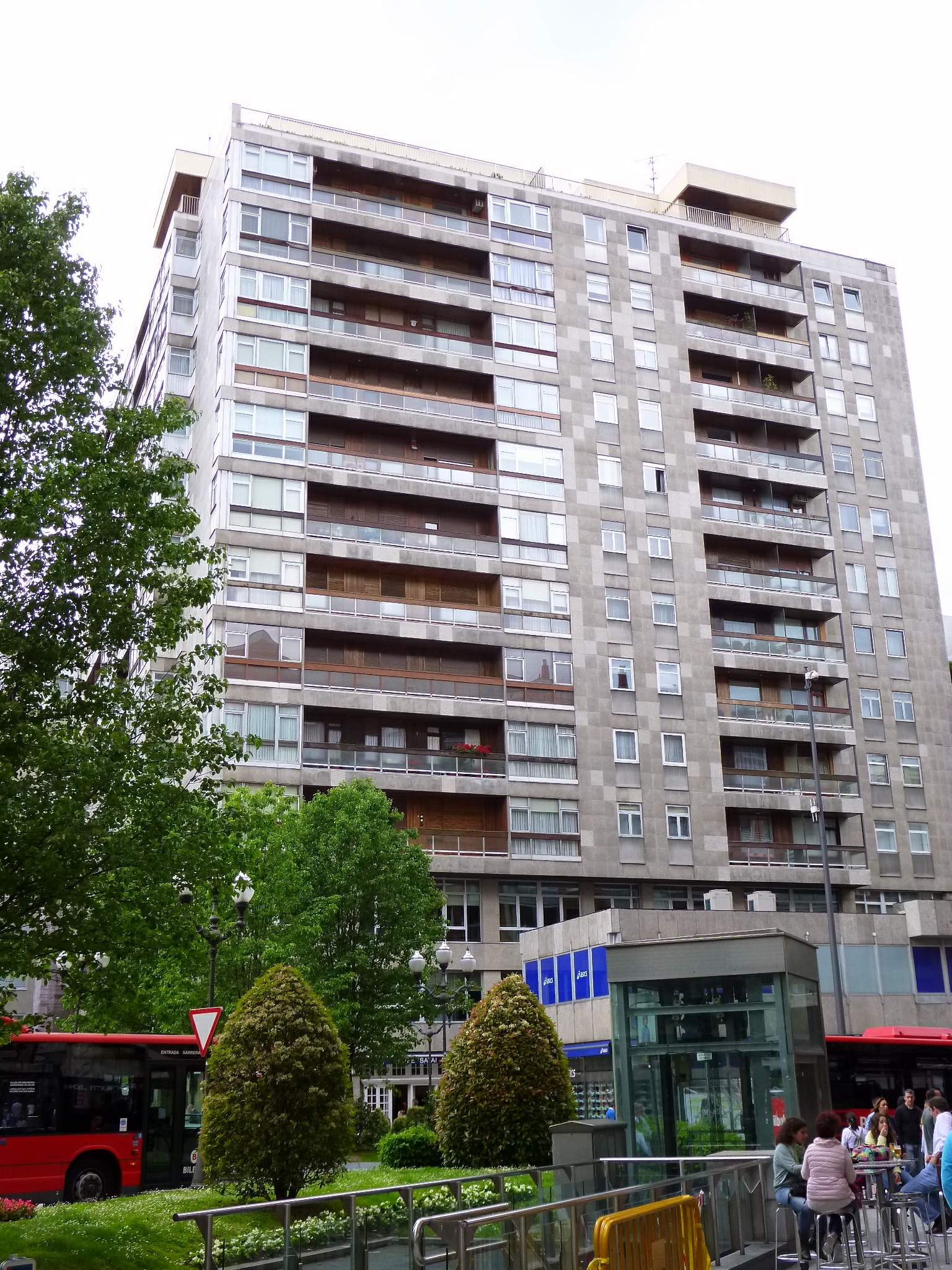 Plaza de Emilio Campuzano (Bilbao)